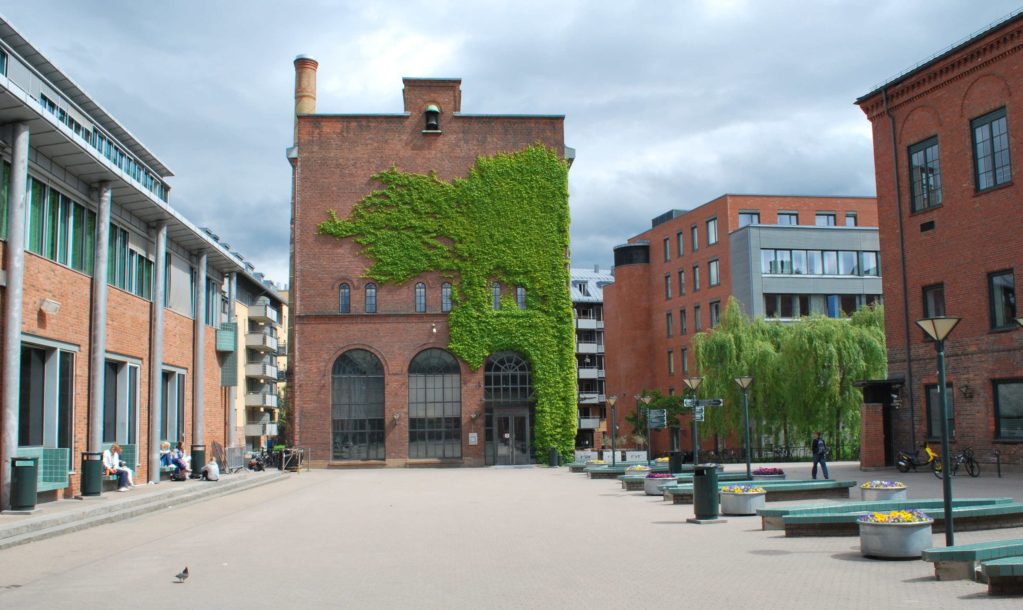 Høgskolen i Oslo og Akershus, campus ved Pilestredet, med Fyrhuset